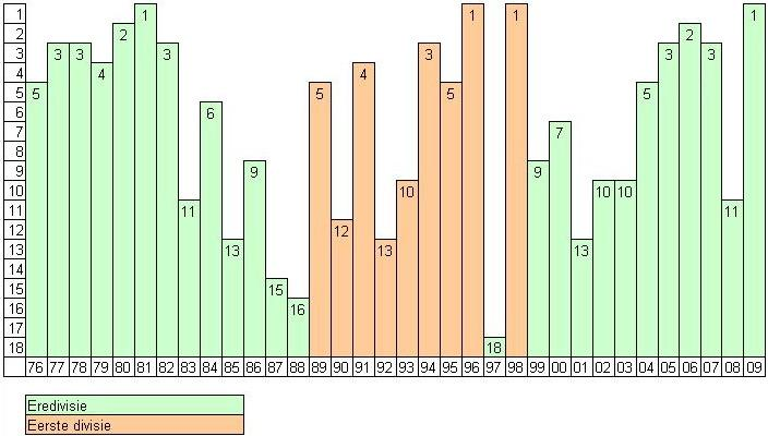 AZ Eredivisie Results 1976-2009